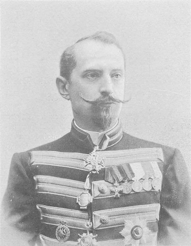 Сергей Балтазарович Скадовский, член Государственного Совета по выборам, от Таврической губернии.